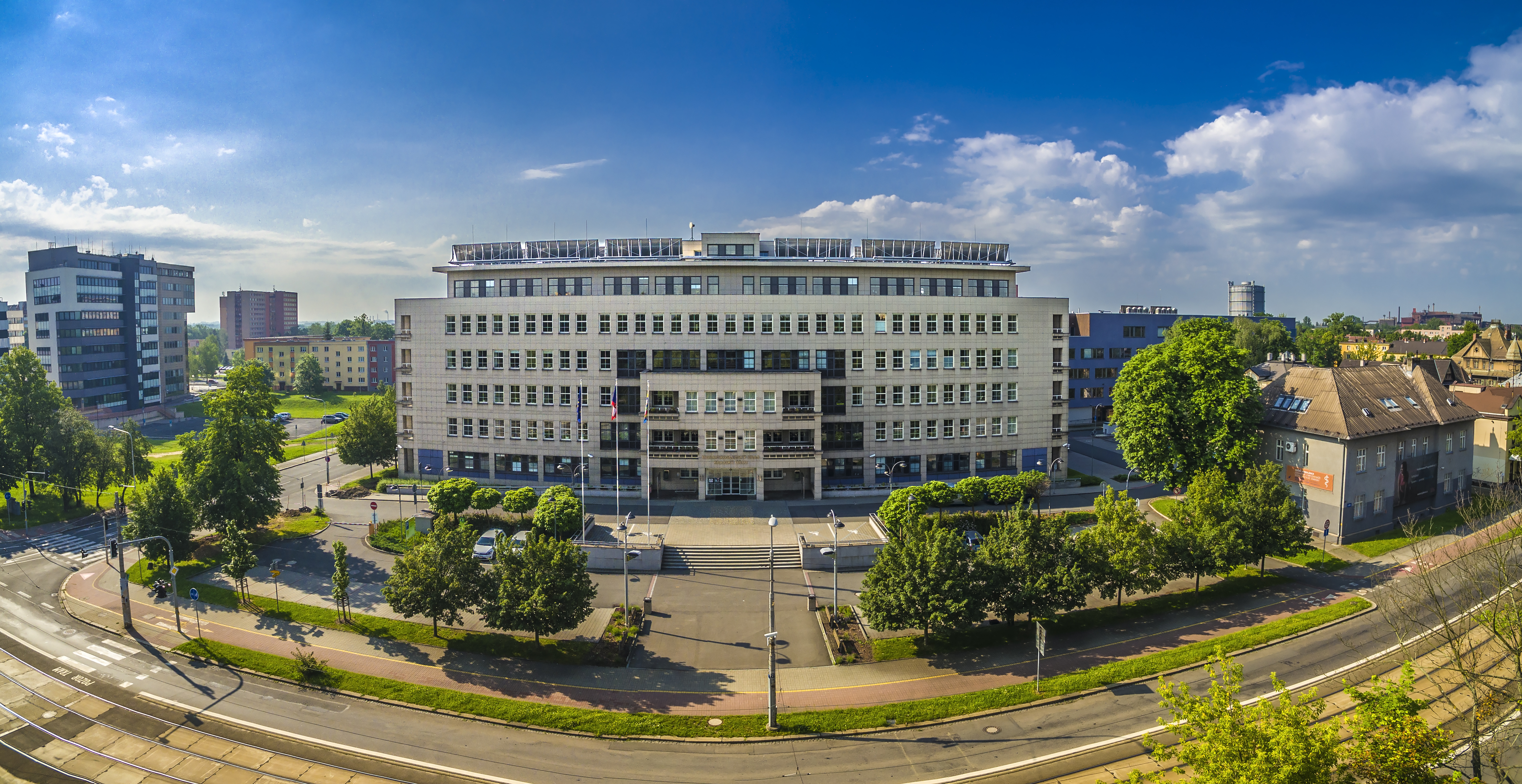 Regional Authority - Moravian-Silesian Region